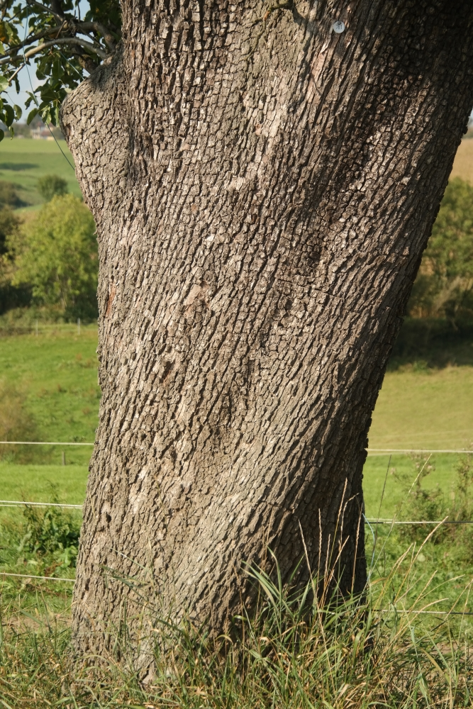 Der typisch gewundene Stamm einer Ölligsbirne